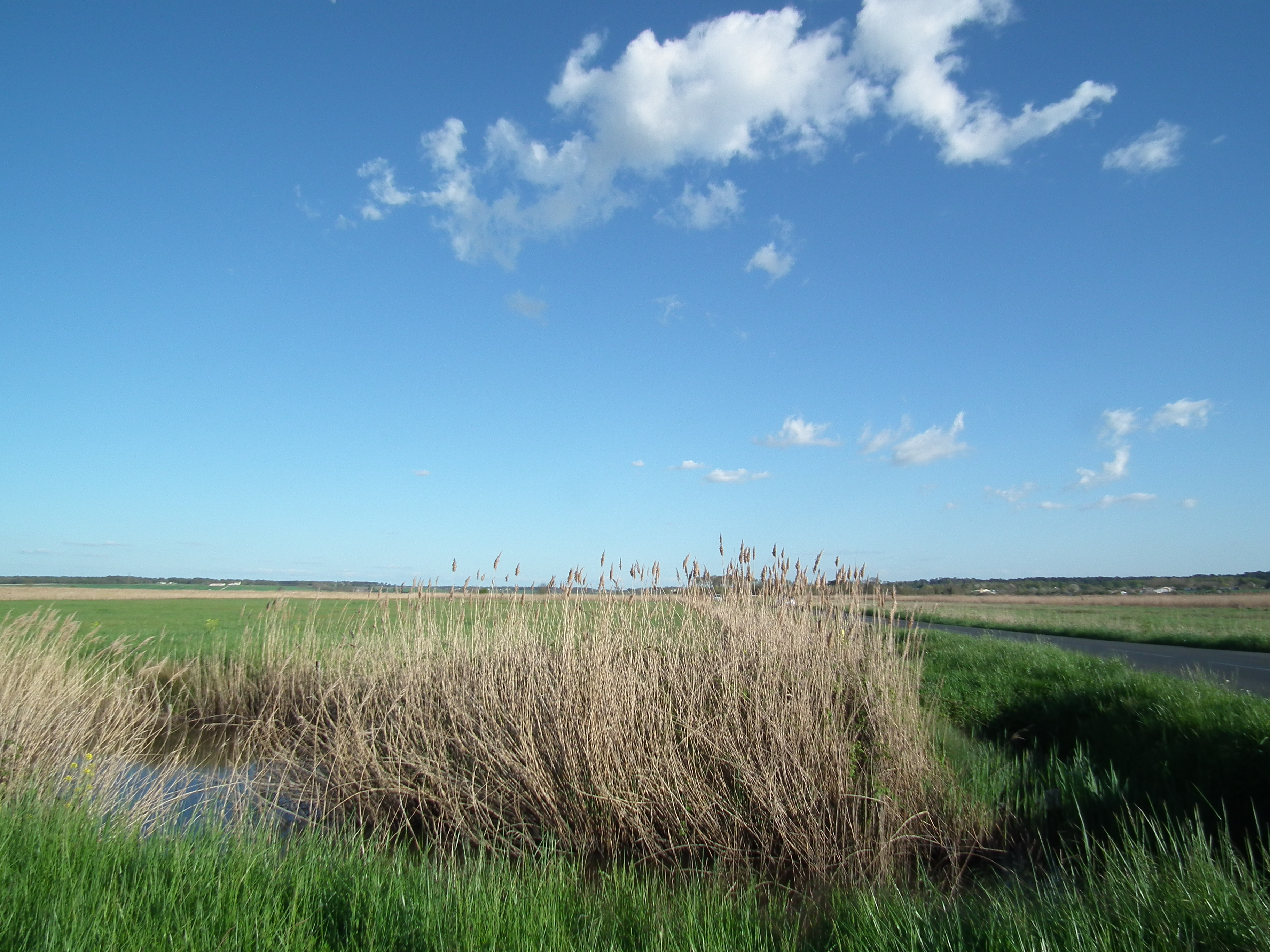 Vue des marais de Saint-Augustin a Etaules